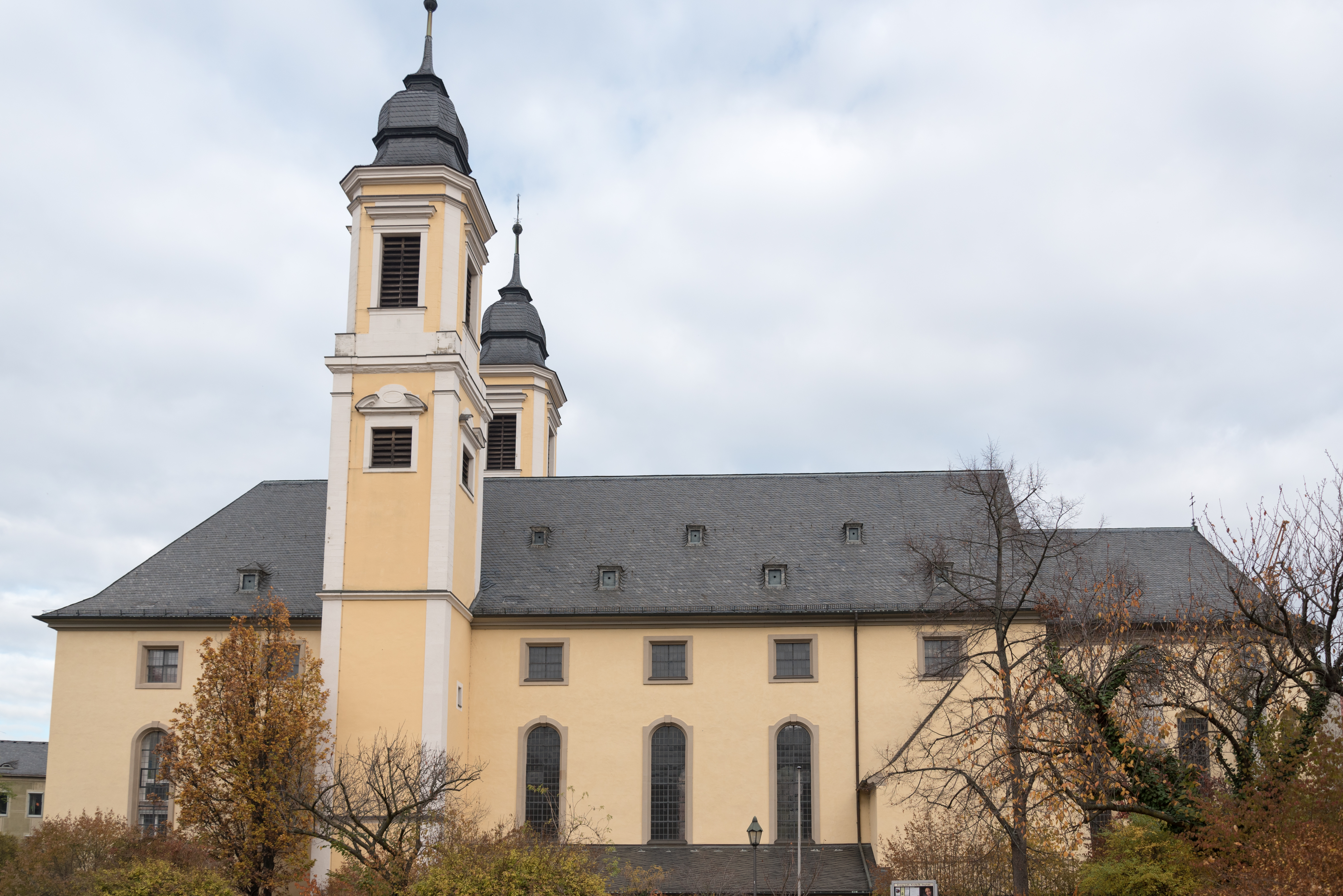 Würzburg, St. Stephan